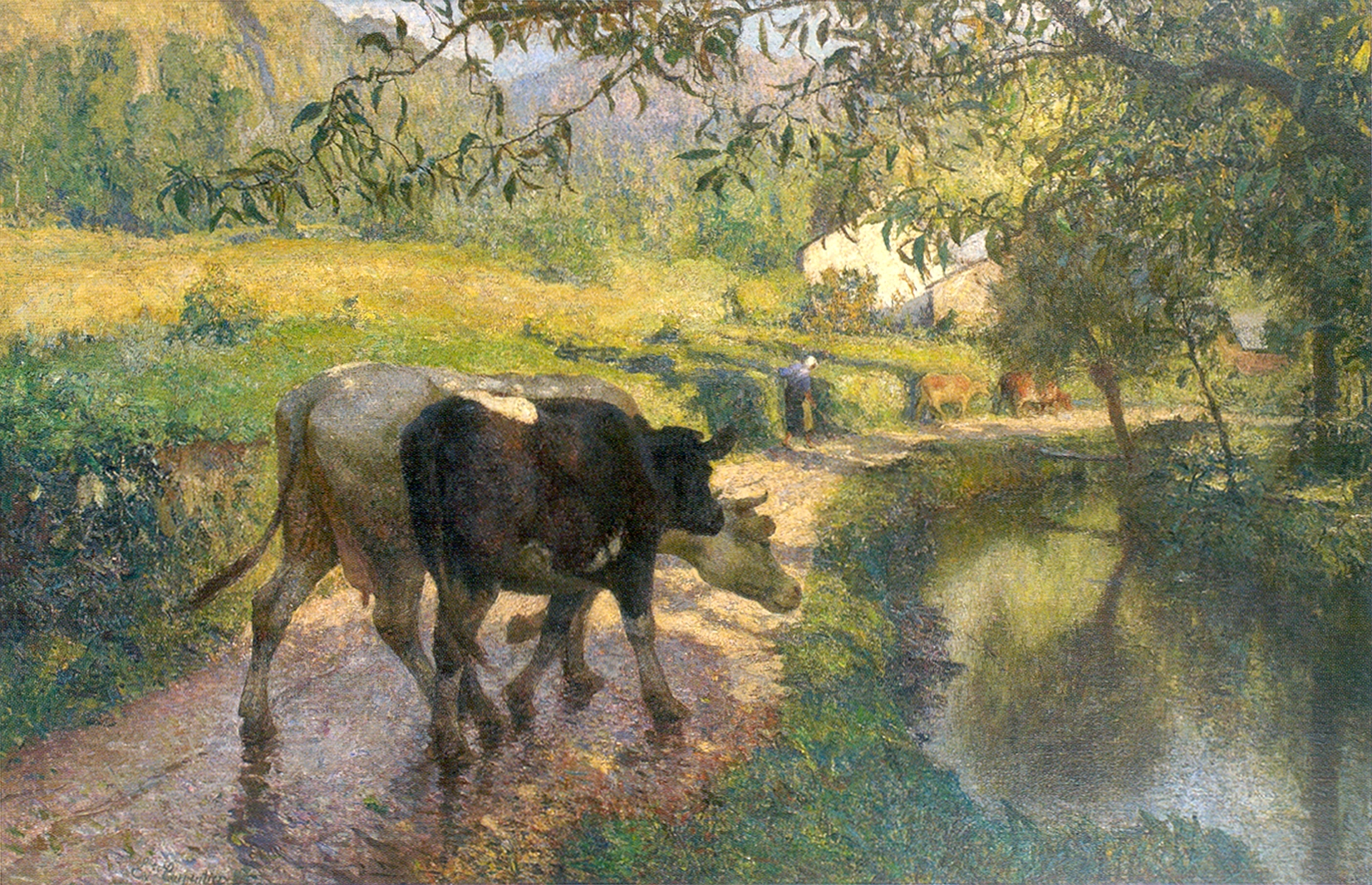 Sous les rochers de Logne « Carpentier a exprimé les beautés de nos Ardennes d'une toute autre façon que le poétique Auguste Donnay. Par la grande toile intitulée "Sous les rochers de Logne", l'artiste s'est posé en luministe. On a dit à l'époque que "c'est un Claus de la meilleure manière". Le paysage presque sans ciel serait confus sans la fermeté avec laquelle les plans ont été établis. Le soleil descend sur la voûte tamisée par le feuillage. L'écran formé par le veau et la vache qui le bouscule réserve un maximum d'éclairage remarquable. » - Fritz Carpentier, fils de l'artiste. (Jacques Goijen, L'Ecole liégeoise du paysage : ma merveilleuse aventure, cat. expo. Stavelot, Ed. Chauveheid, 1991.)